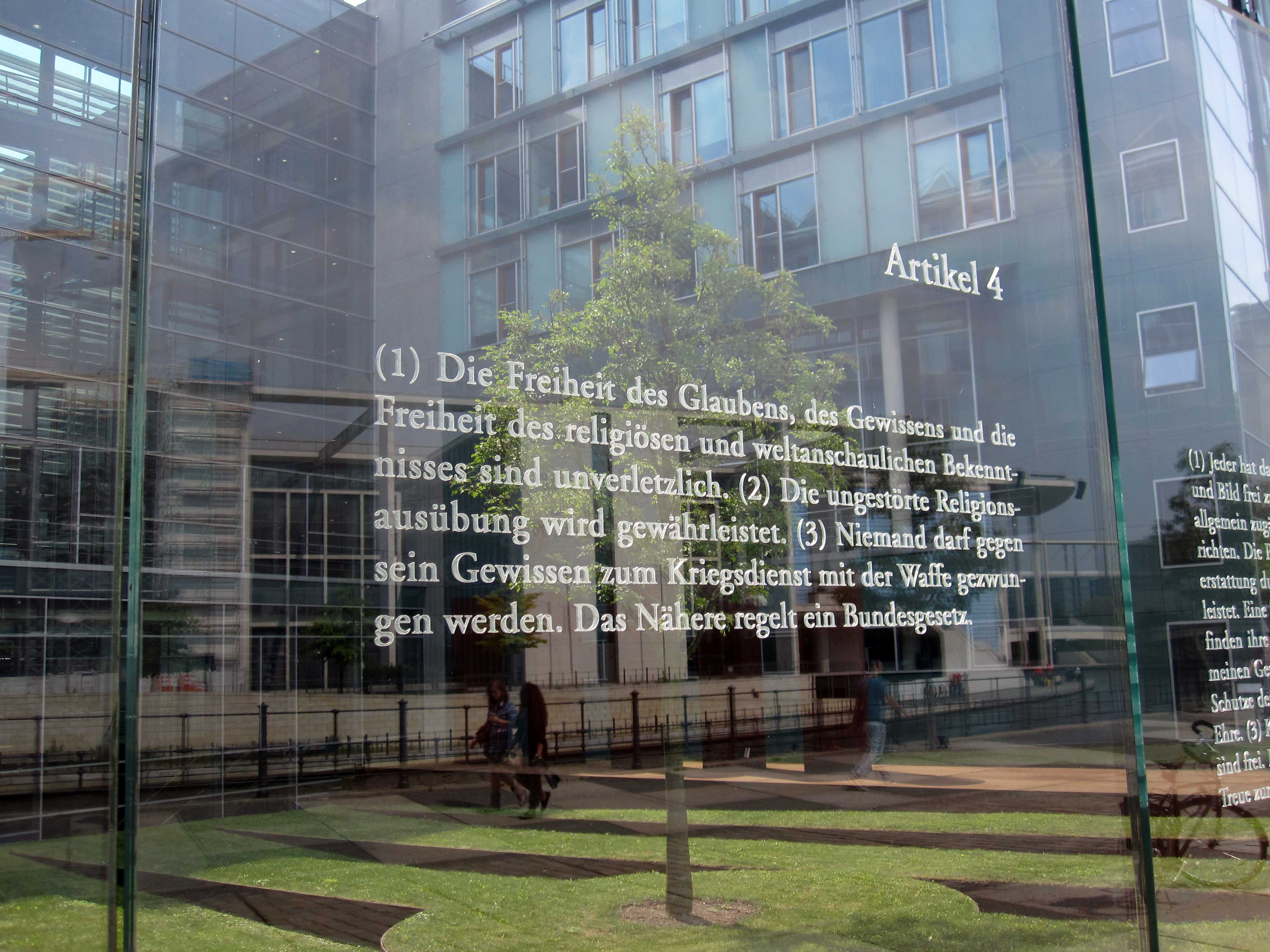 Bundestagsgebäude in Berlin: Der israelische Künstler Dani Karavan hat in drei Meter hohe Glasscheiben, die einen Außenhof des Jakob-Kaiser-Hauses im Uferbereich zur Spree begrenzen, die 19 Grundrechtsartikel des Grundgesetzes mit Laser eingraviert. „Die Grundrechtsartikel schweben gleichsam in Augenhöhe vor dem Haus der Fraktionen, dem Jakob-Kaiser-Haus“ (Andreas Kaernbach, Deutscher Bundestag).